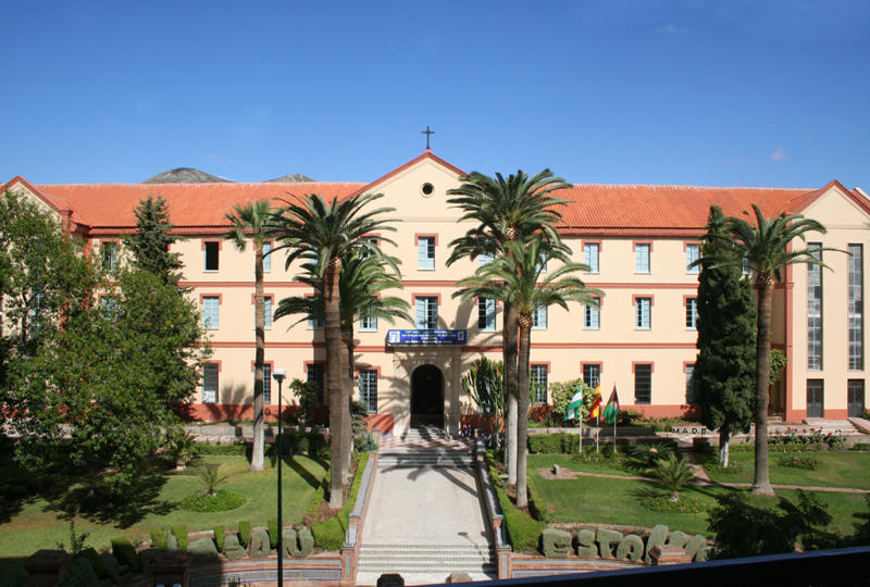 Fachada del colegio San Estanislao de Kostka, en la calle Juan Sebastián Elcano de Málaga, actualmente.